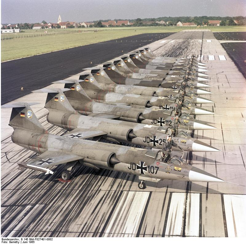 Reportage Bundeswehr: JG 74 (Jagdgeschwader)